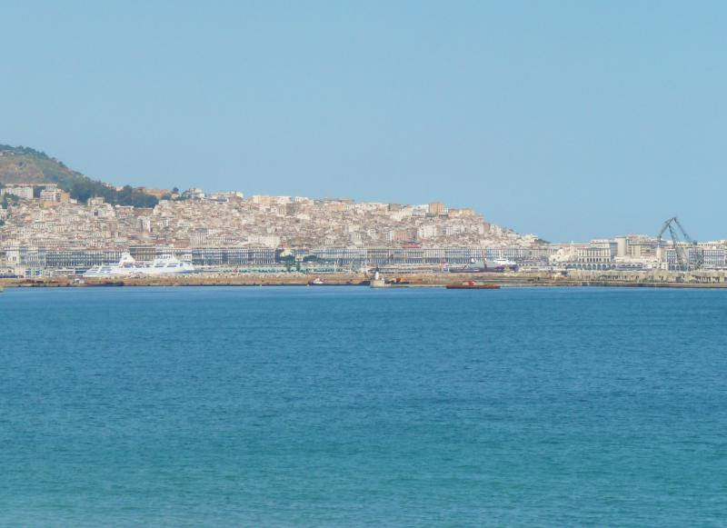 Alger vue depuis la mer avec sa Casbah, le front de Mer, et la mosquée Jamâa el Jdid.